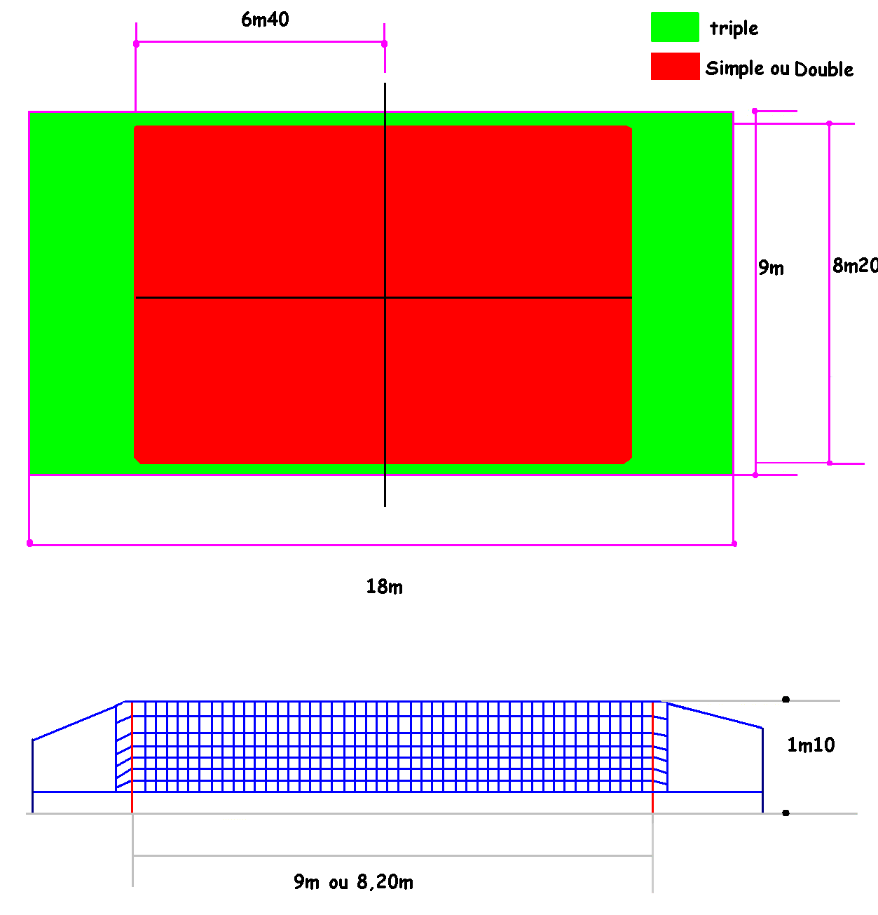 Filet de Tennis Ballon